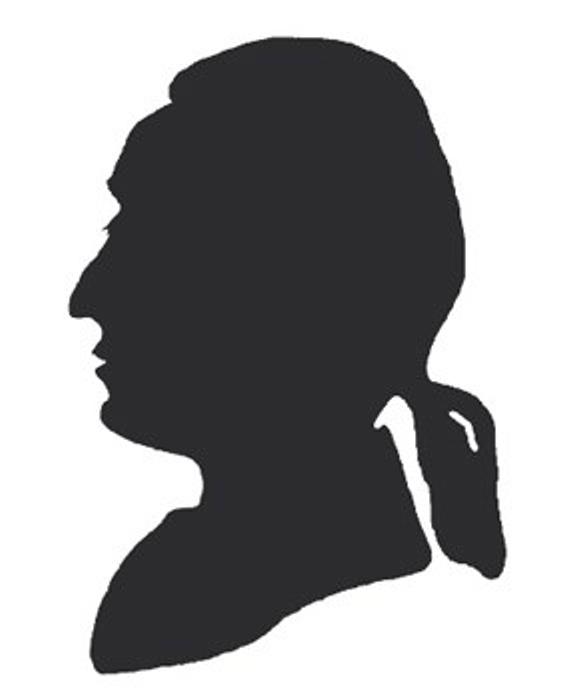 Der Rauchwarenhändler und Kunstmäzen Gottlieb Benedict Zemisch, Schattenriss